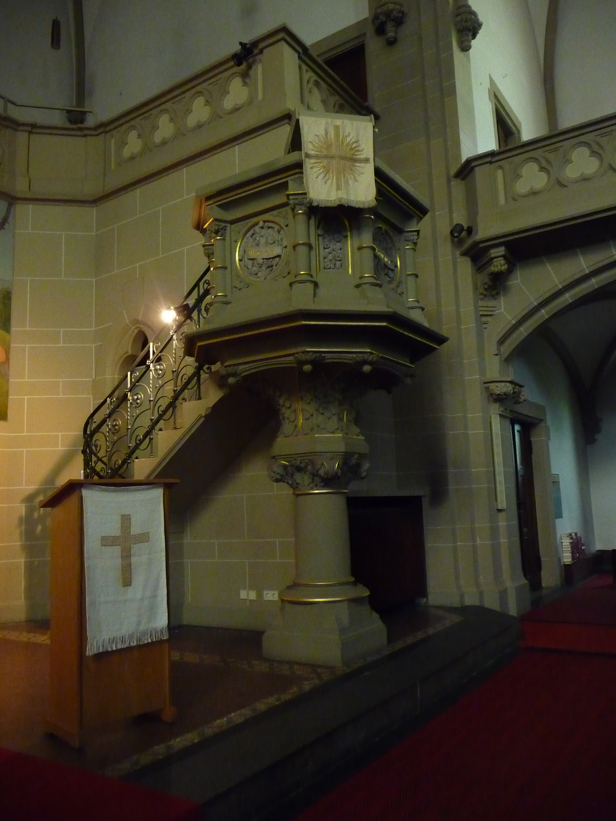 Kanzel in der evangelischen Johanneskirche im Heidelberger Stadtteil Neuenheim (Baden-Württemberg, Deutschland)